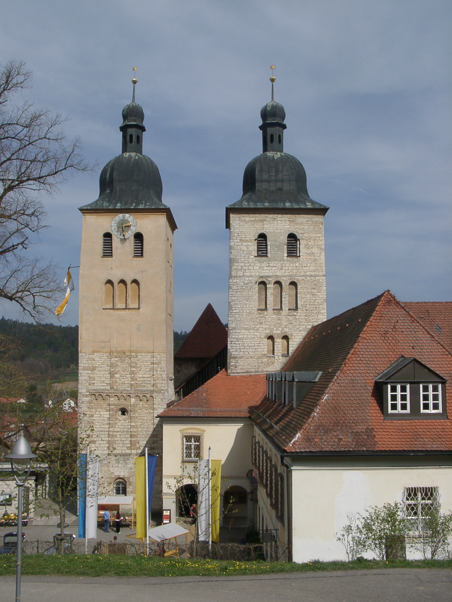 Abtei Plankstetten